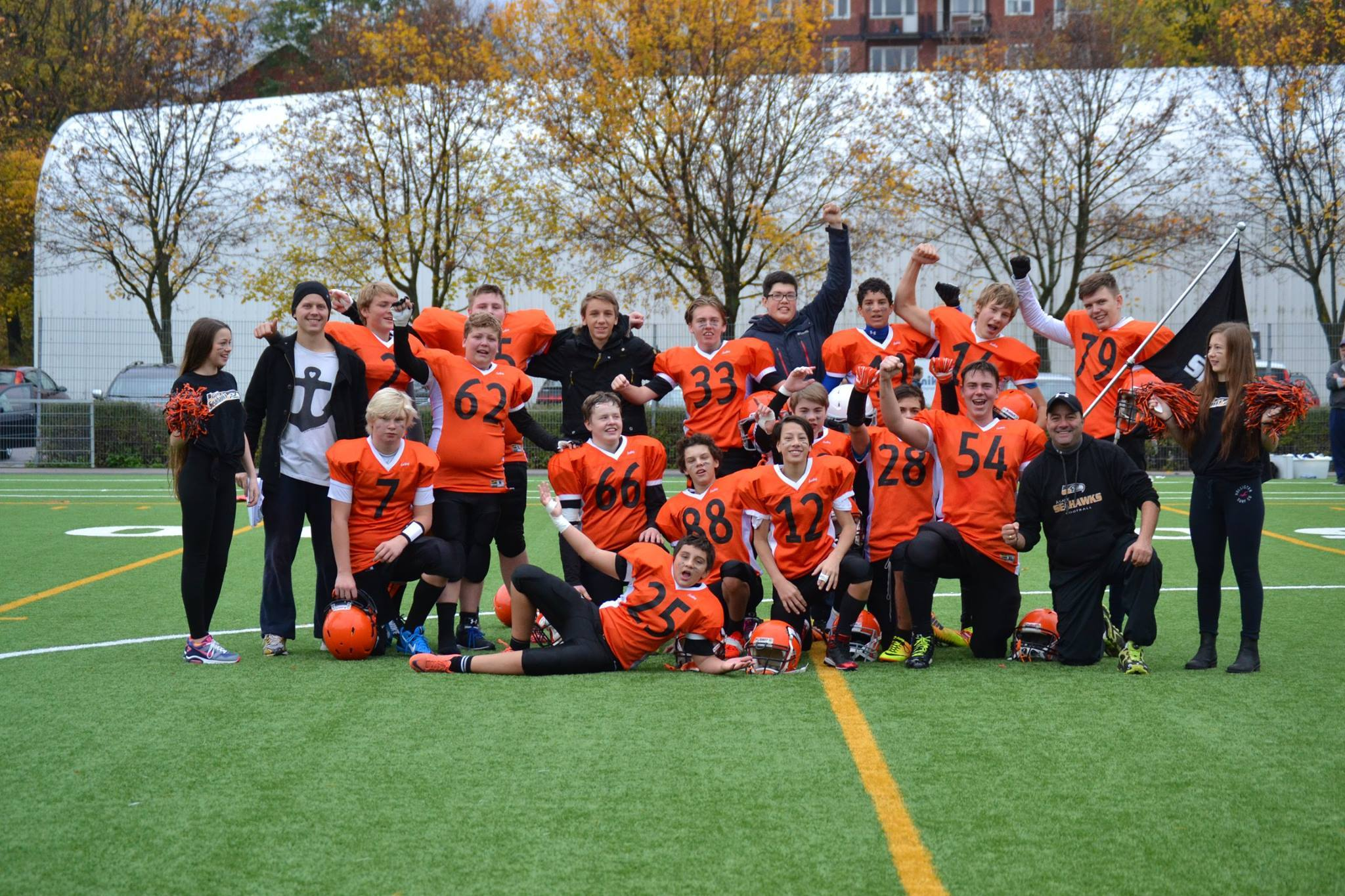 Åsanes U15 lag 2014